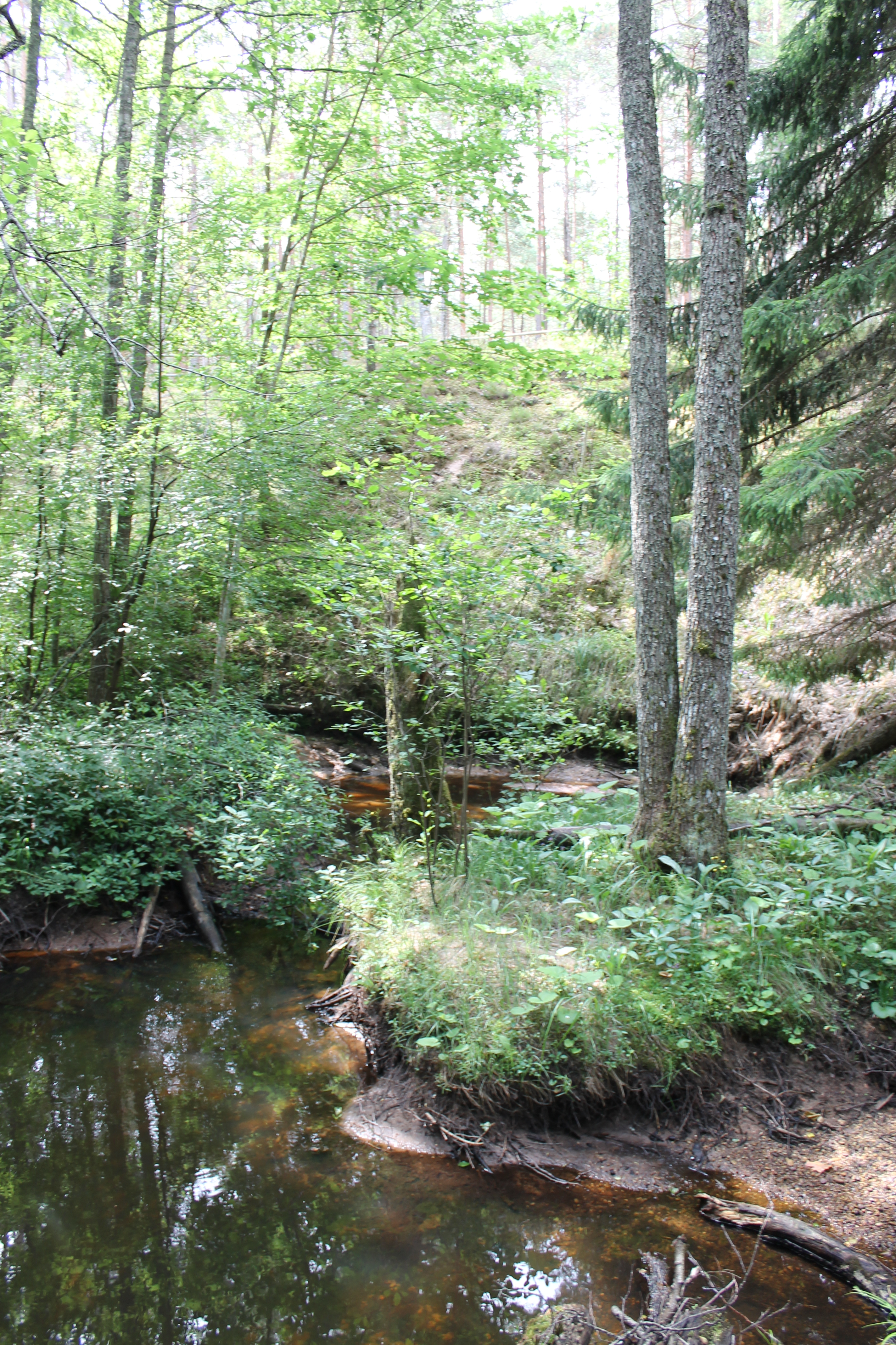 Vanajõe org Hiiumaal